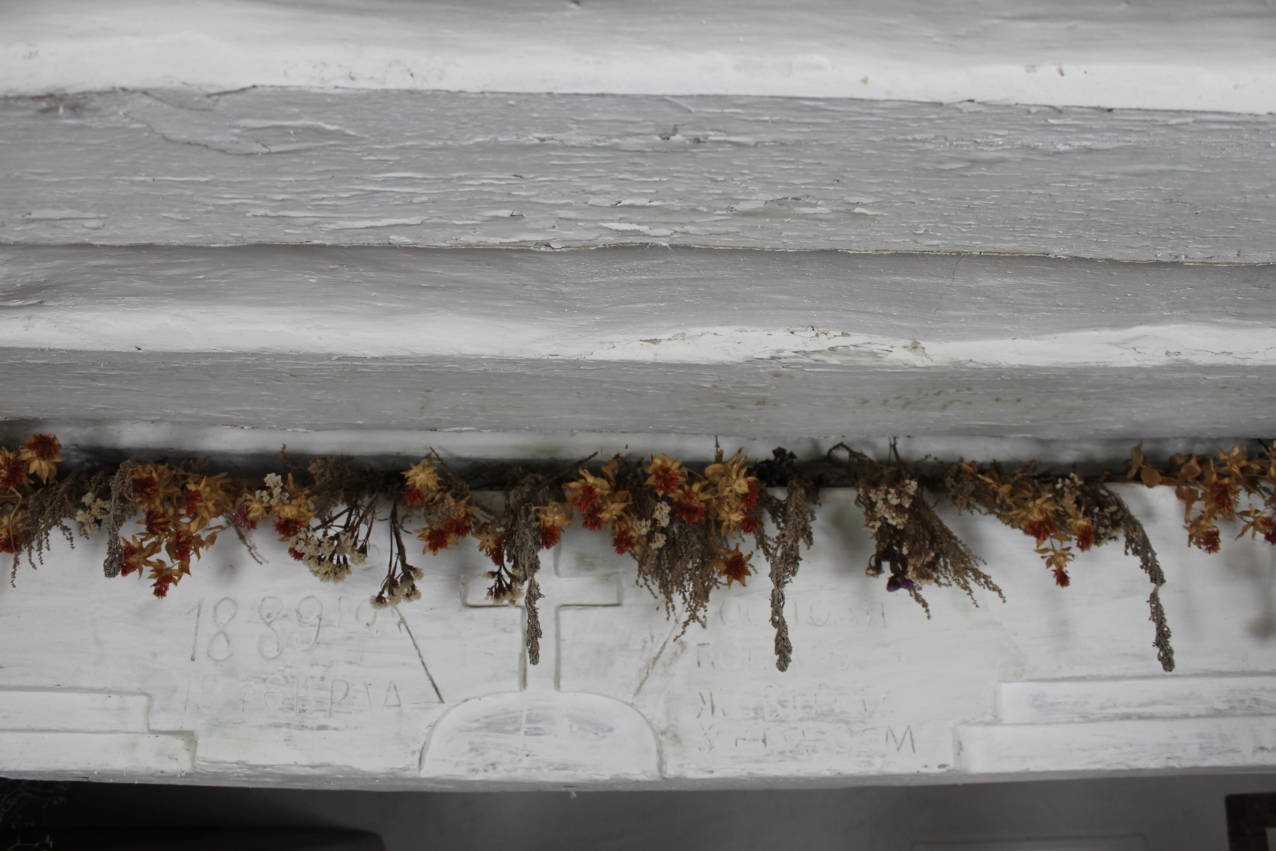 3. Інтер’єр хати безземельника., Хата селянина-безземельника з с. В’юнище